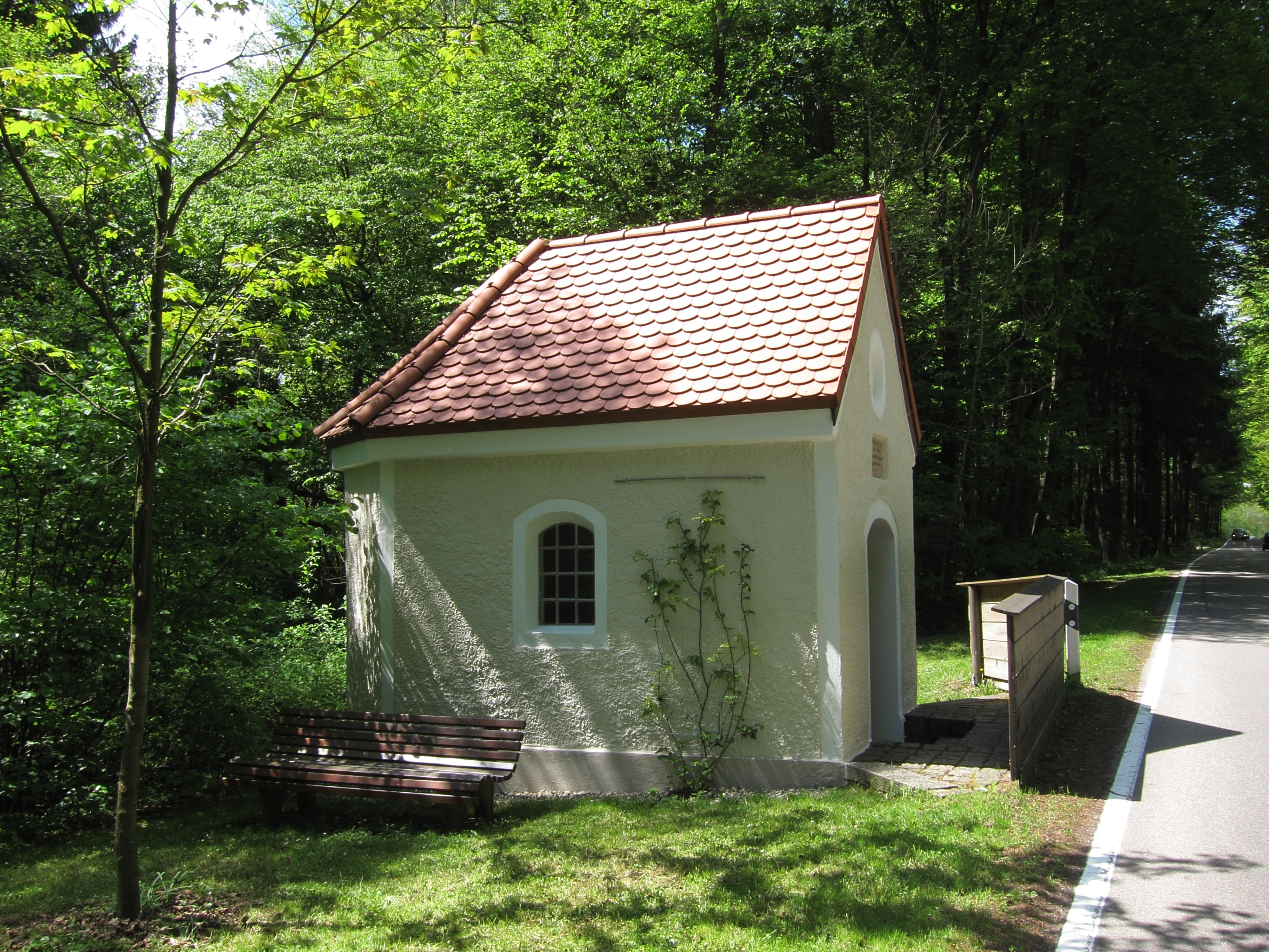 Hesselfurt (Bernau), Münchener Straße; Wegkapelle; Anfang 20. Jahrhundert.